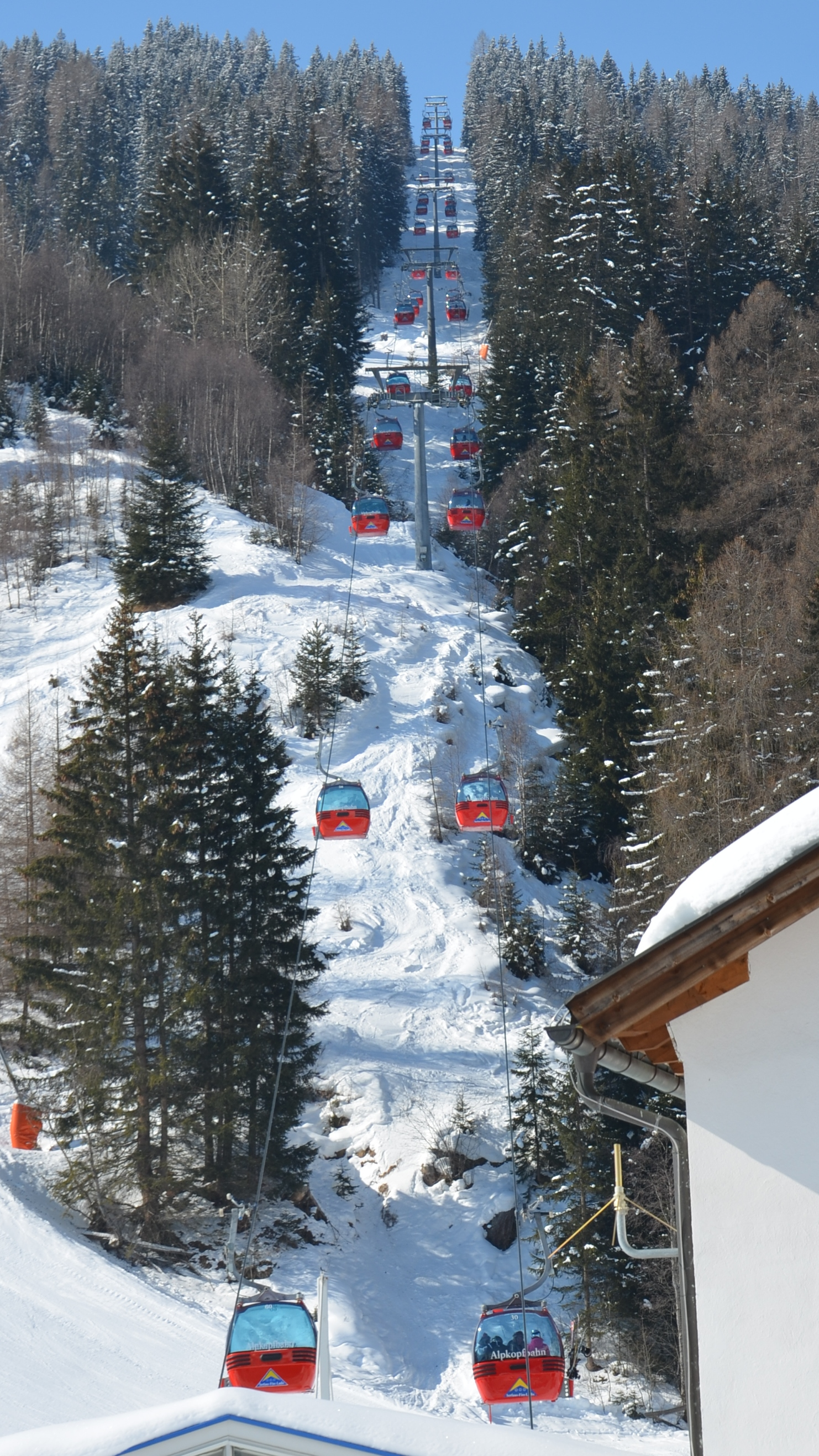 Die Albkopfbahn in Serfaus